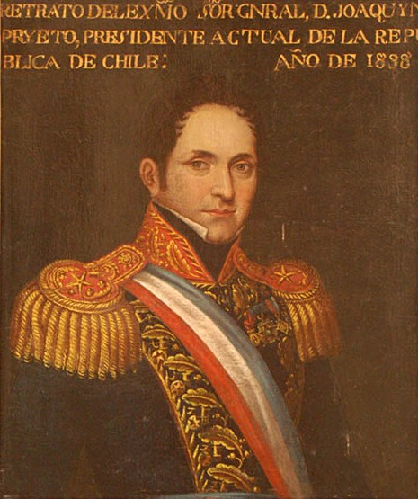 Retrato del presidente chileno José Joaquín Prieto